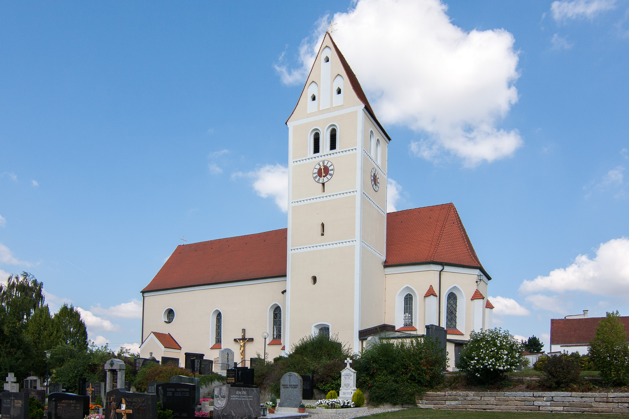 Katholische Pfarrkirche Mariae Empfängnis; 15. Jahrhundert, Ausstattung 18. Jahrhundert; mit Ausstattung.This is a photograph of an architectural monument.